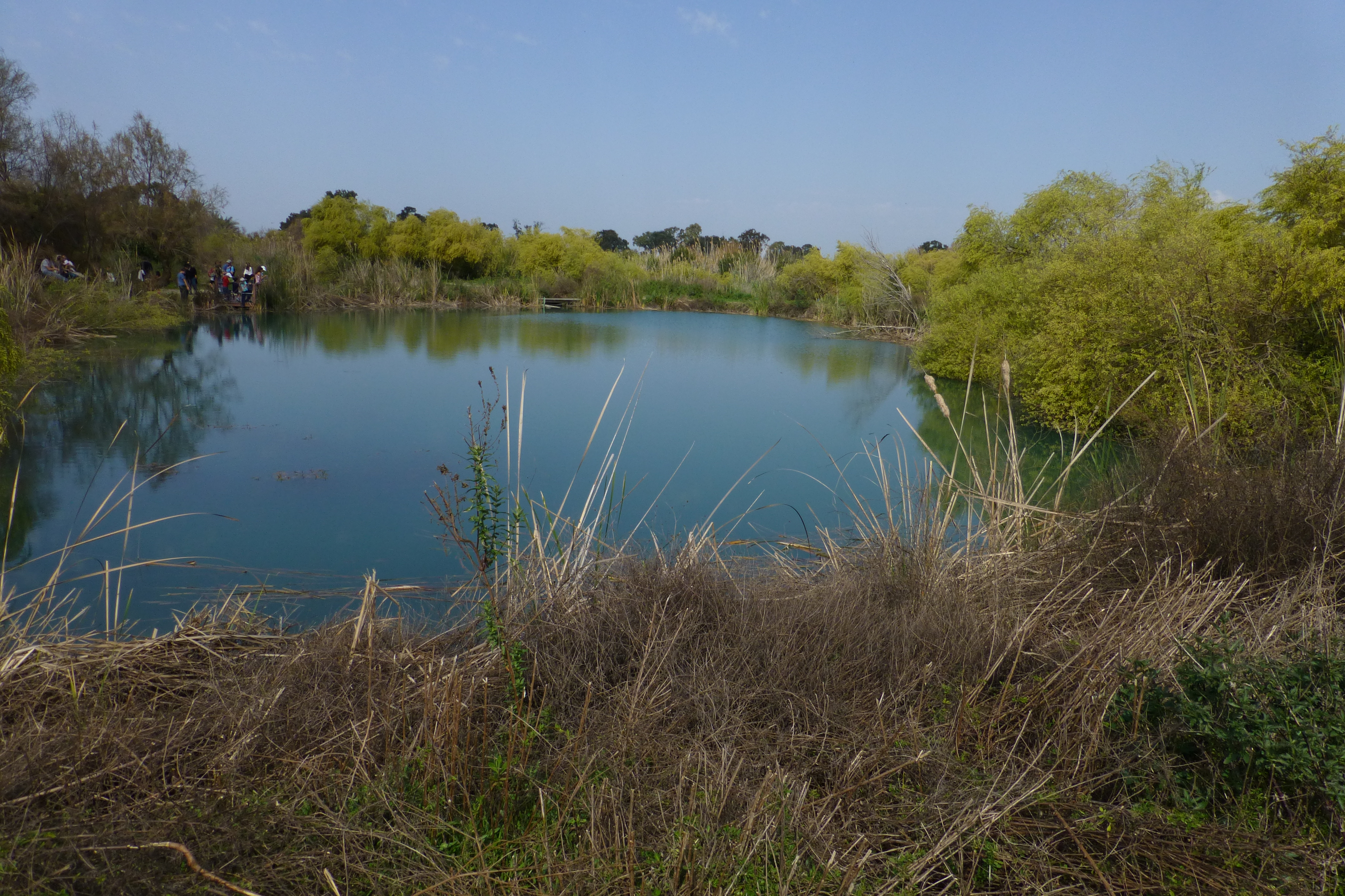 שמורת טבע בעמק זבולון, מזרחית לקריית ביאליק. השמורה כוללת הן את המעיינות והביצות המהווים את מקורו של נחל נעמן והן את האתר הארכאולוגי תל אפק. השמורה הוכרזה ב-1979 והיא משתרעת על פני 660 דונם. ב-1996 הוכרה השמורה כ"אתר רמסר" בהתאם לאמנת רמסר לשימור ולפיתוח בר-קיימא של בתי גידול לחים.